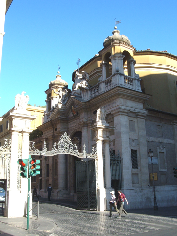 Chiesa di Sant'Anna dei Palafrenieri, a Roma, nella Città del Vaticano. Foto personale.